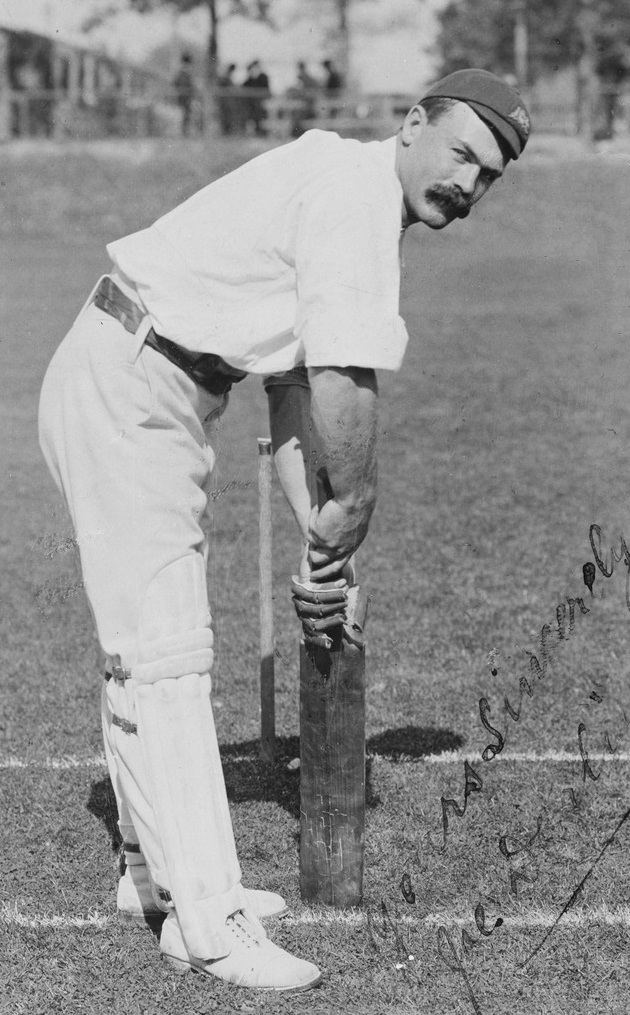 Joe Darling